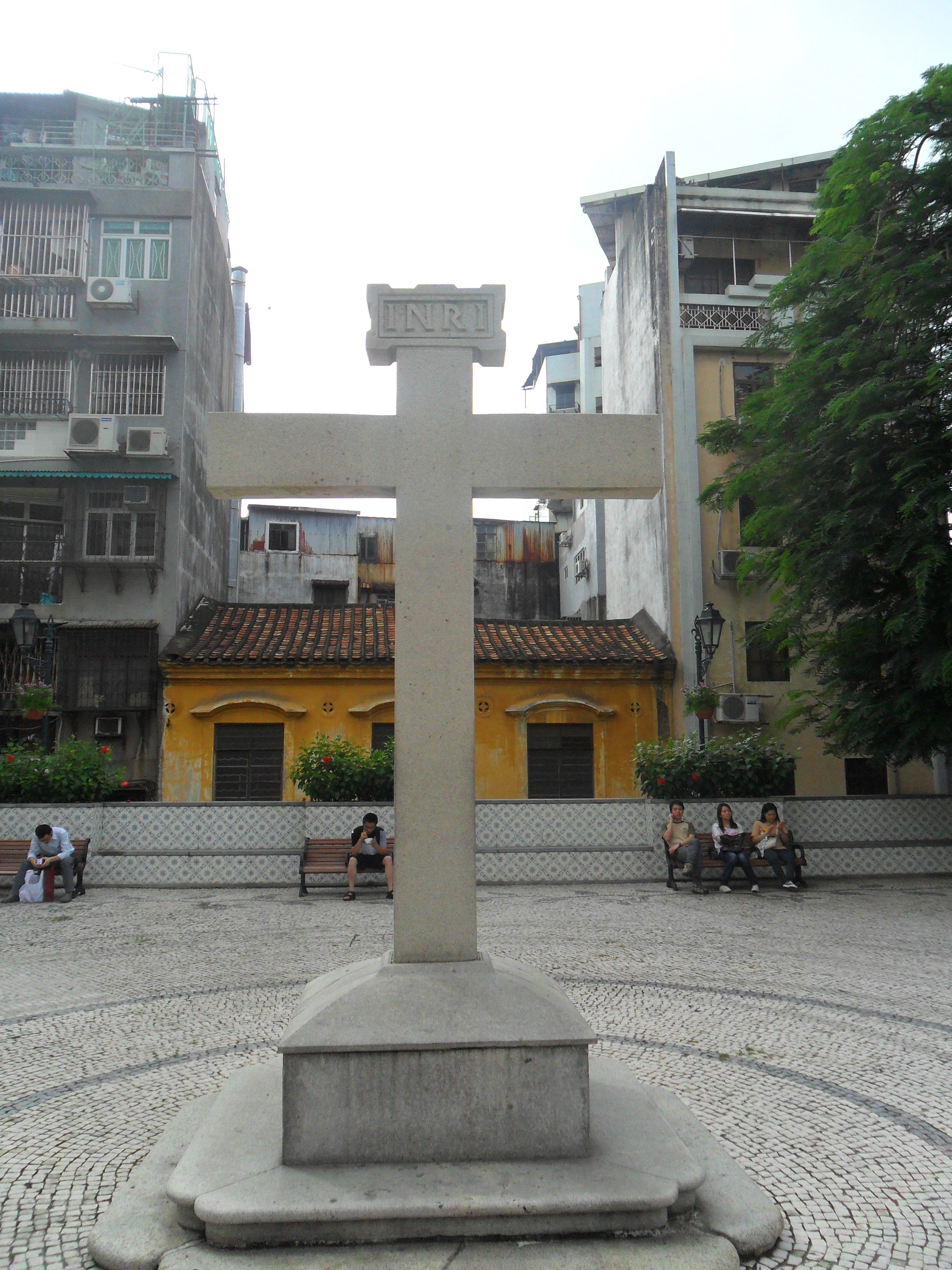 中文(香港): 聖母玫瑰堂, 香港, 中國